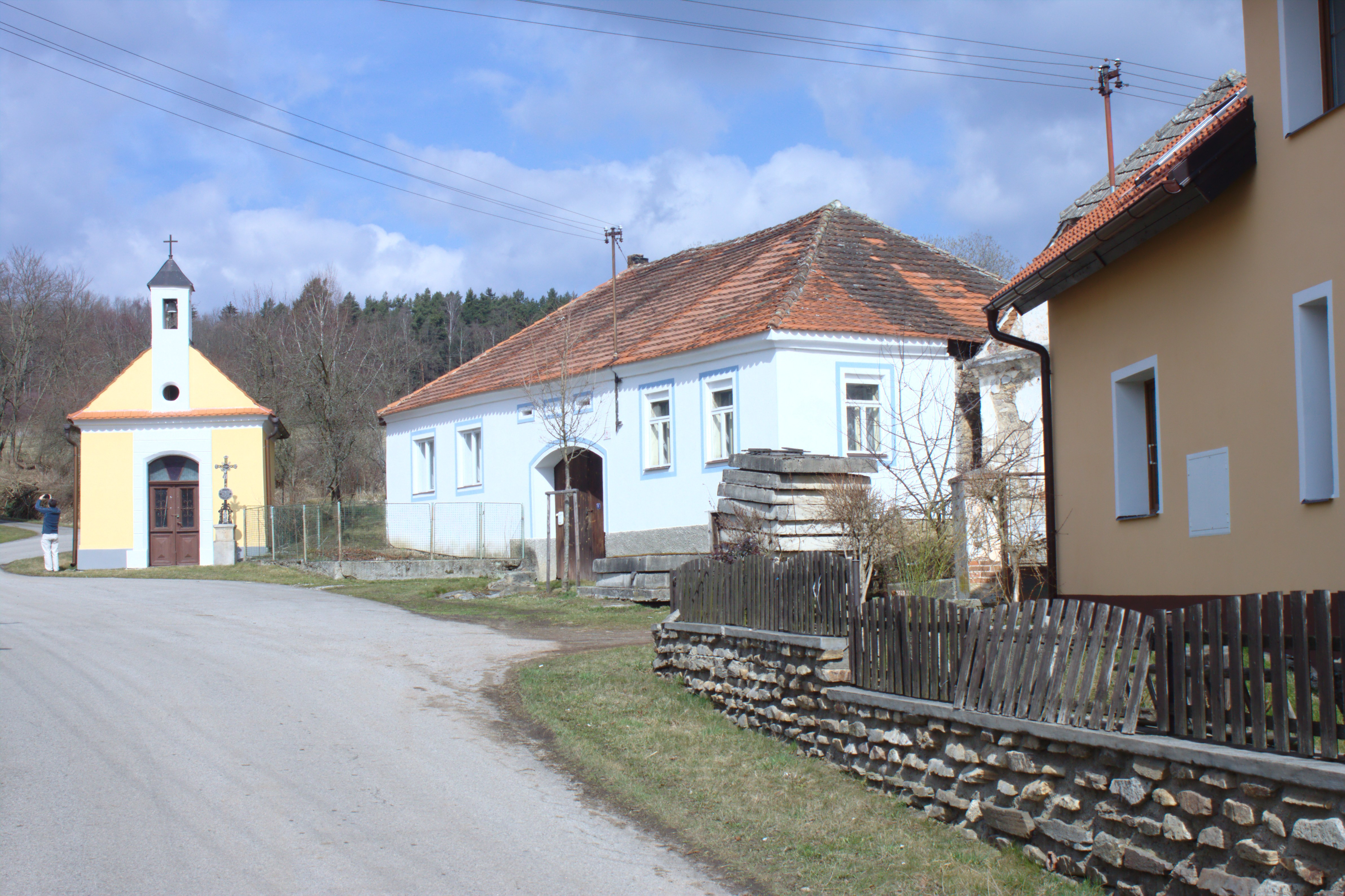 Náves ve vesnici Hoříkovice Project: Fotíme Česko